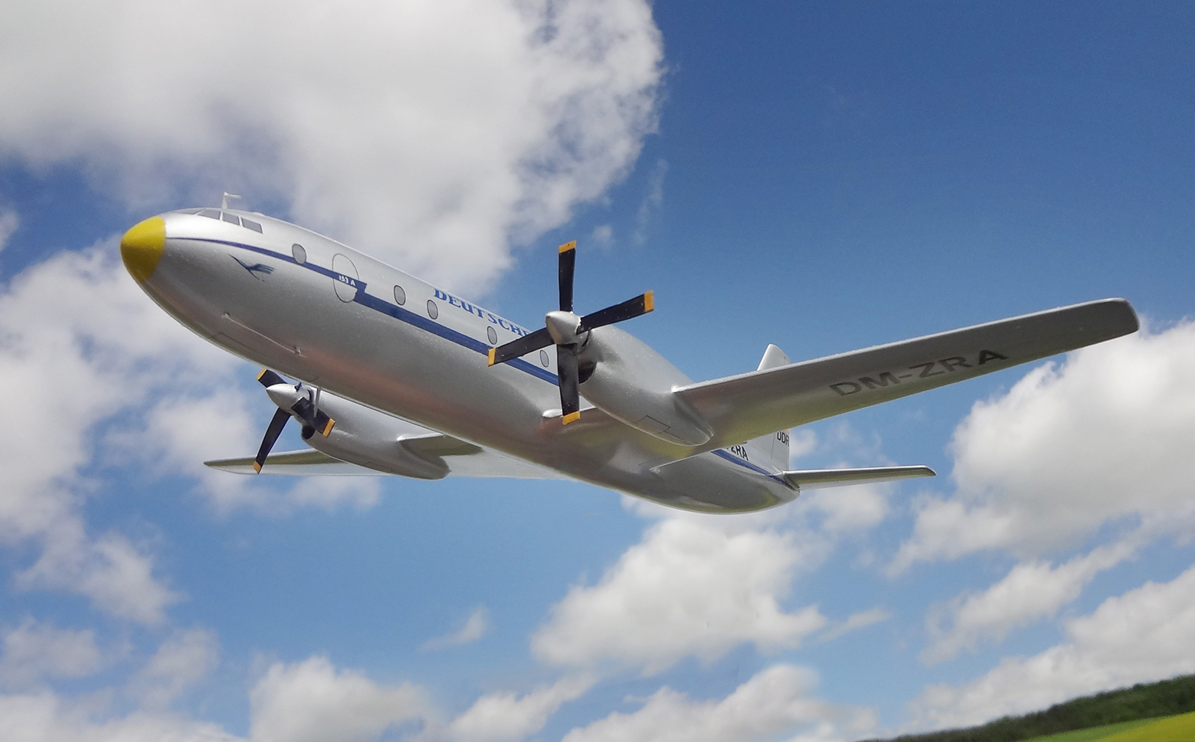 Ein zukunftsträchtiges Projekt im Flugzeugwerk Dresden war die 153A, geplanter Erstflug 1965 (siehe Avro 748, Erstflug 24. Juni 1960). Das ebenfalls in der DDR neu konstruierte ZTL-Triebwerk Pirna 020 (3.700 kp) entsprach dem international höchsten Niveau und versprach einen wirtschaftlichen Einsatz. Wie sehr Baade auf die 153A setzte, zeigt, dass er 1958 mehrmals in England war und über den Kauf von 20 Triebwerke Rolls-Royce Tyne 11 verhandelte.